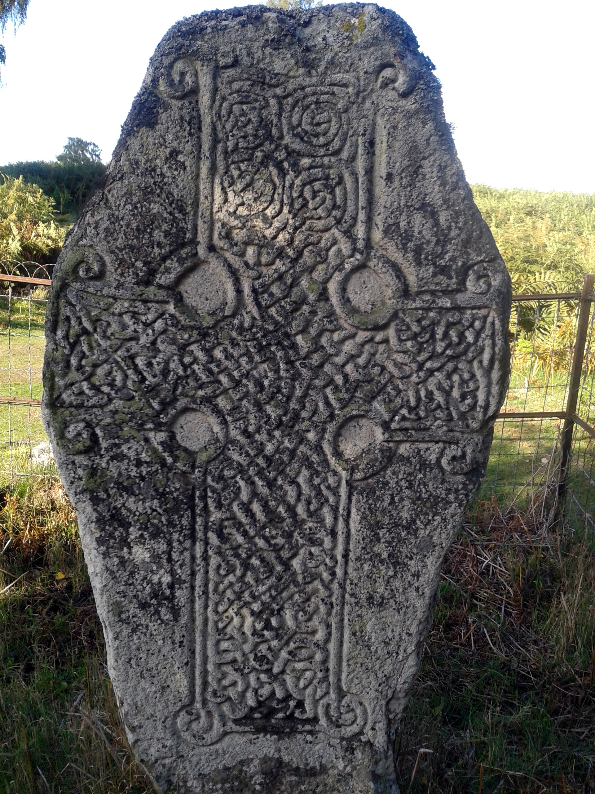 Piktischer Kreuzstein aus dem 9. Jahrhundert. Nordseite Loch Kinord. Naturschutzgebiet Muir of Dinnet